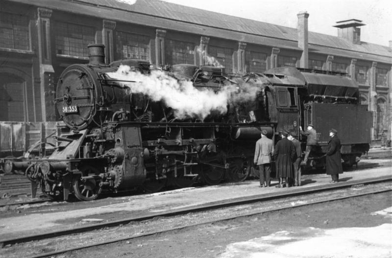 RAW Stendal, Kohlenstaub-Dampflokomotive Illus-Merker RAW Stendal - Geburtsstätte der Kohlenstaub-Lok. Im Reichsbahnausbesserungswerk Stendal wurden in gemeinsamer Arbeit der Arbeiter und Techniker zwei neue Loks entwickelt, die für den Schnellzug- und Güterverkehr eine wesentliche Verbesserung bedeuten. Es sind die in der Öffentlichkeit bereits bekannt gewordenen Kohlenstaub- und Kohlenstaub-Kondens-Lok. Die Kohlenstaub-Kondens-Lok, die staubfreier und schneller arbeitet, kann sechs Wochen ununterbrochen in Tätigkeit sein, ohne einmal ausgewaschen zu werden. Nach den ersten erfolgreichen Probefahrten werden jetzt 100 Güterlok auf Kohlenstaub umgebaut. U.B.z.: Nach erfolgreicher Probefahrt trifft die Kohlenstaub-Lok wieder im RAW Stendal ein. 3731-49